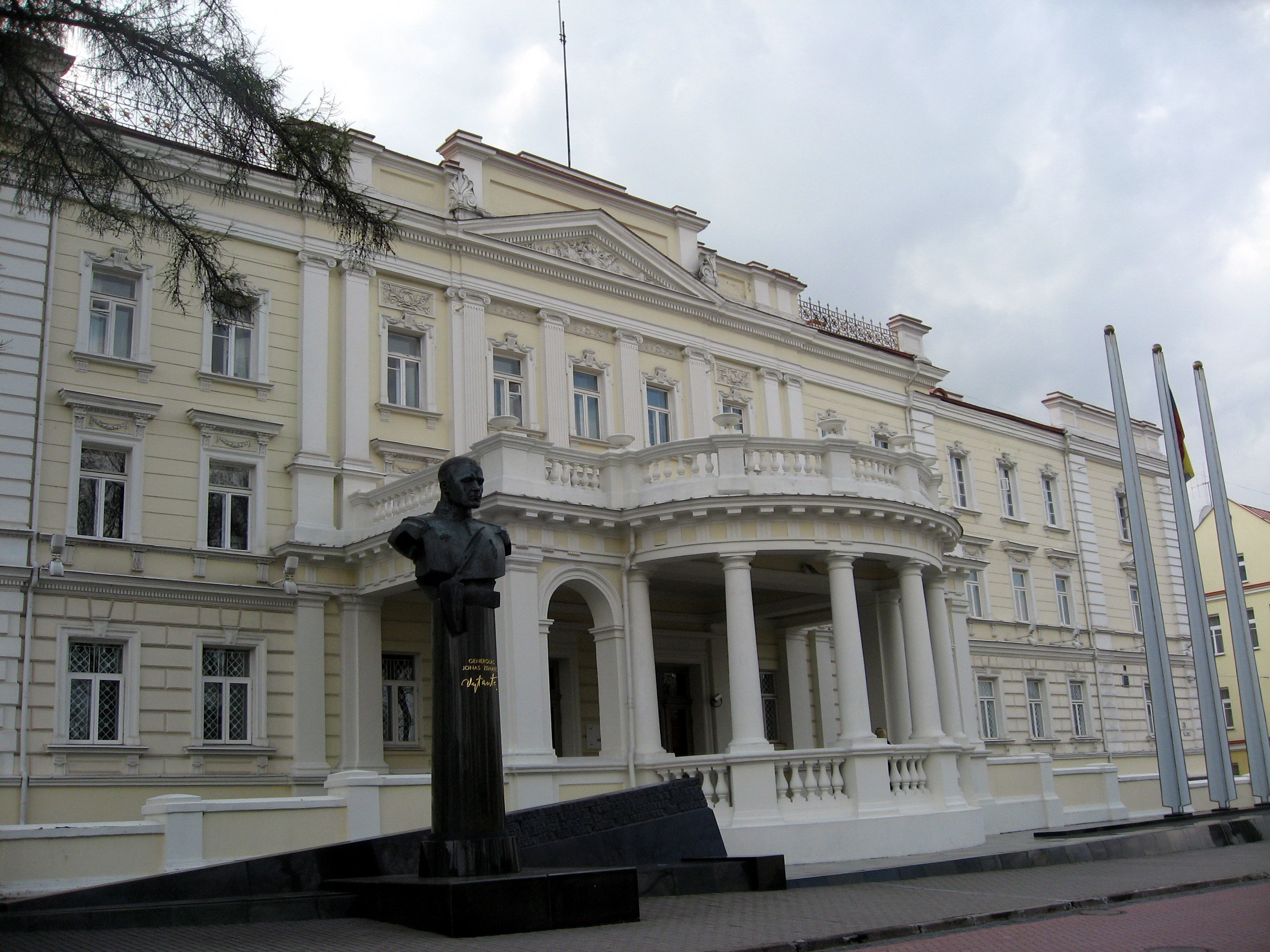 Vilnius